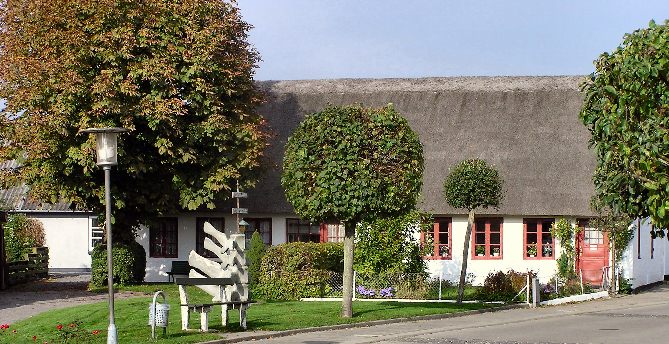 Hals, Danmark